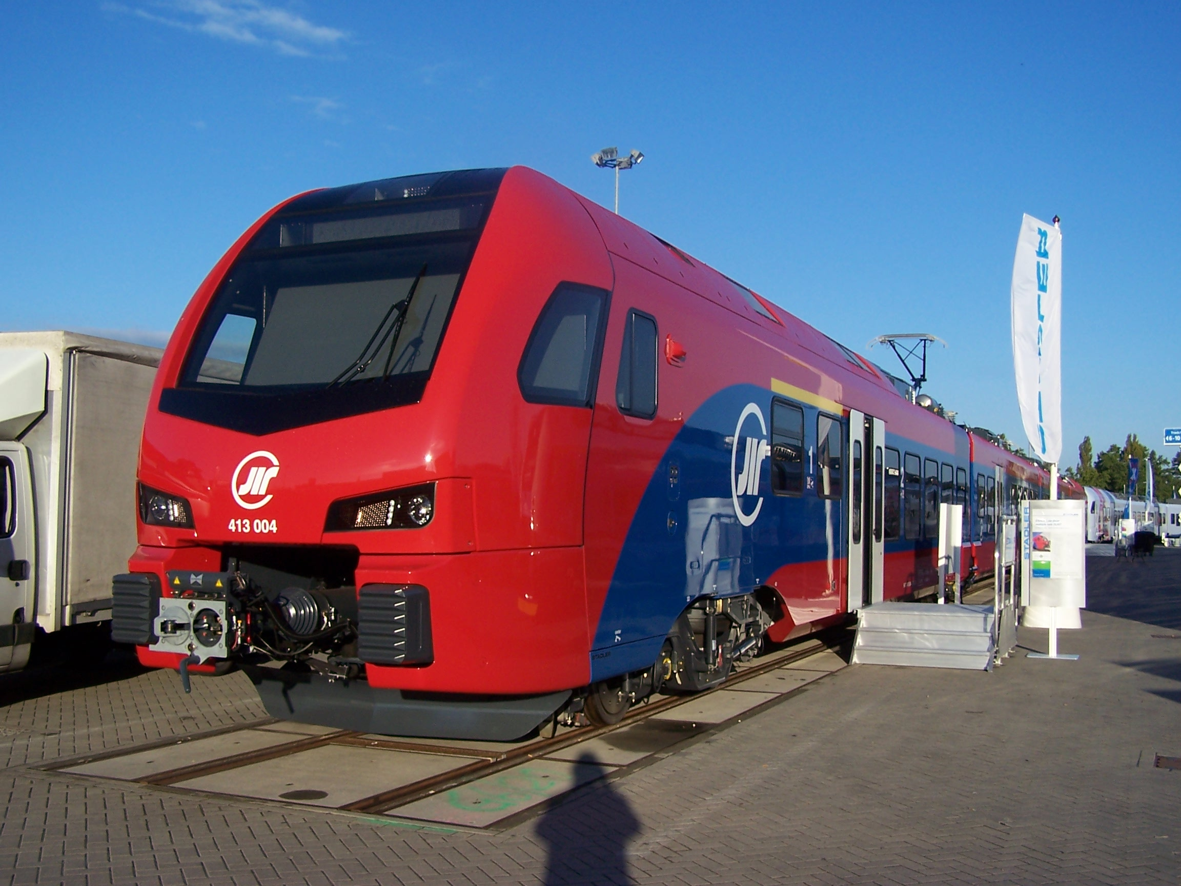 Stadler FLIRT der Železnice Srbije (Serbischen Eisenbahnen ) 413 004 auf der Innotrans 2014 in Berlin.